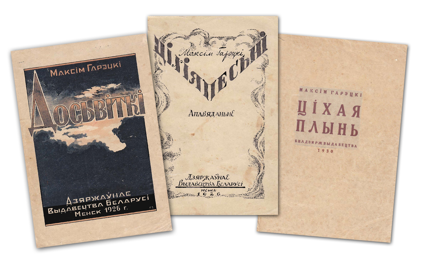 Беларуская (тарашкевіца): Вокладкі зборніка апавяданьняў Максіма Гарэцкага «Досьвіткі» (1926), кнігі «Ціхія песьні» (1926), «Ціхая плынь» (1930).